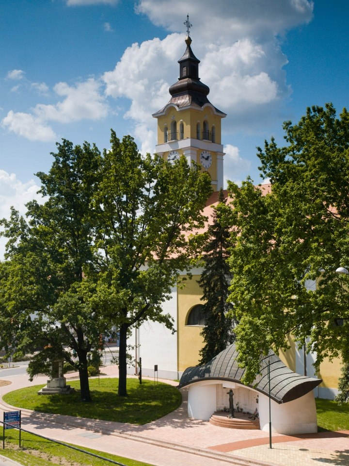 Templomkert a második világháborús emlékművel